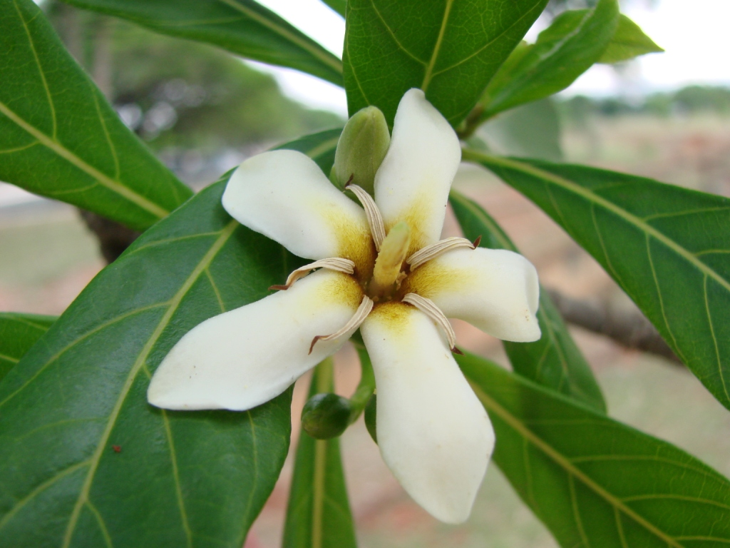 Genipa americana - RUBIACEAE Parque da Cidade - Brasília - Distrito Federal - Brasil.